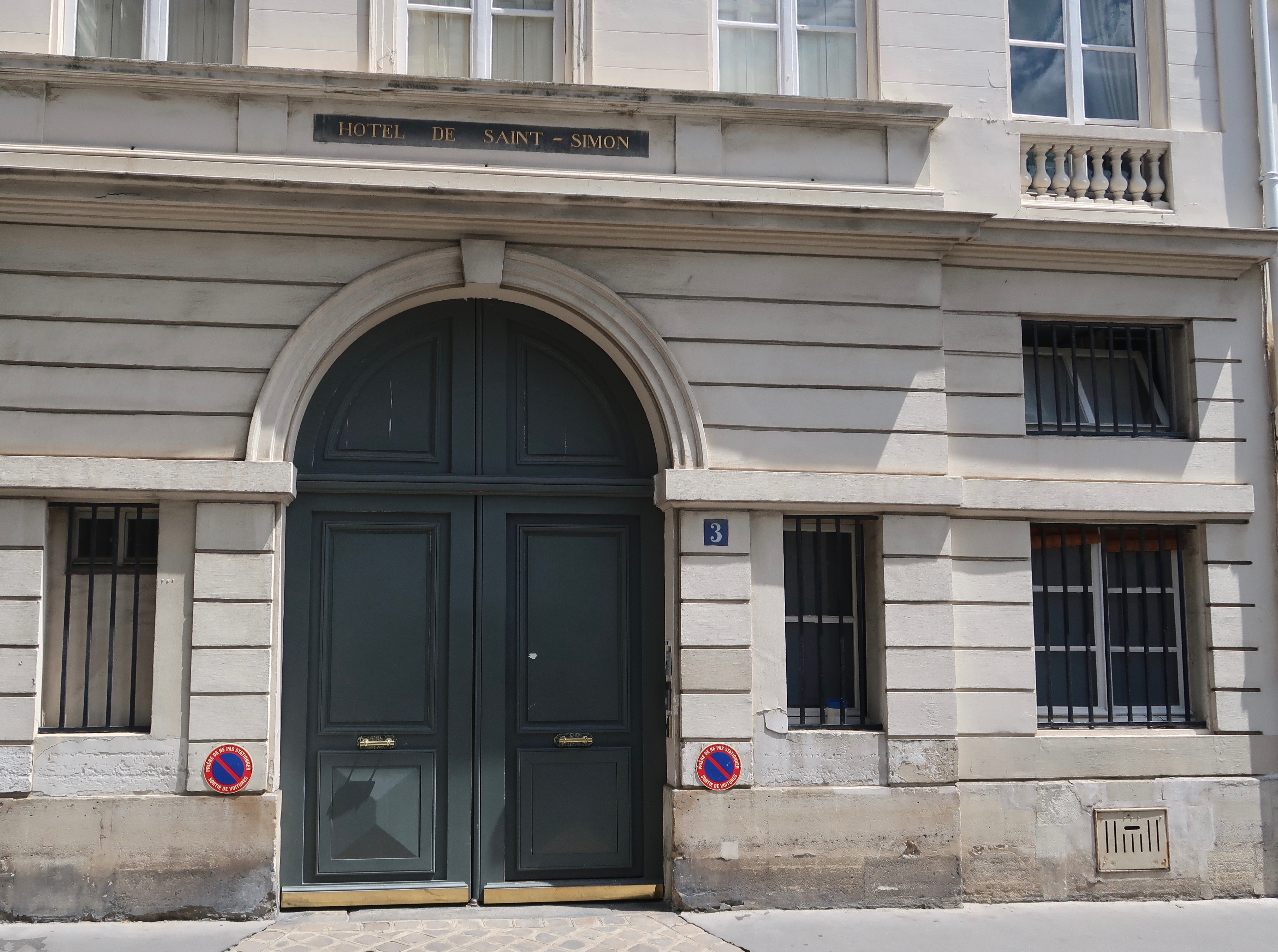 Hôtel de Saint-Simon, 3 rue Monsieur (Paris 7e).